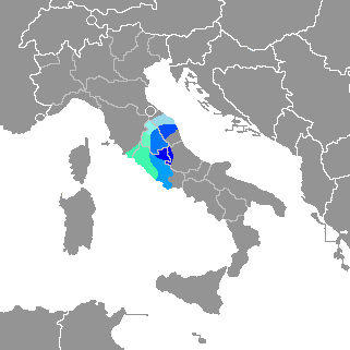 Variedades centrales de las lenguas italianas.